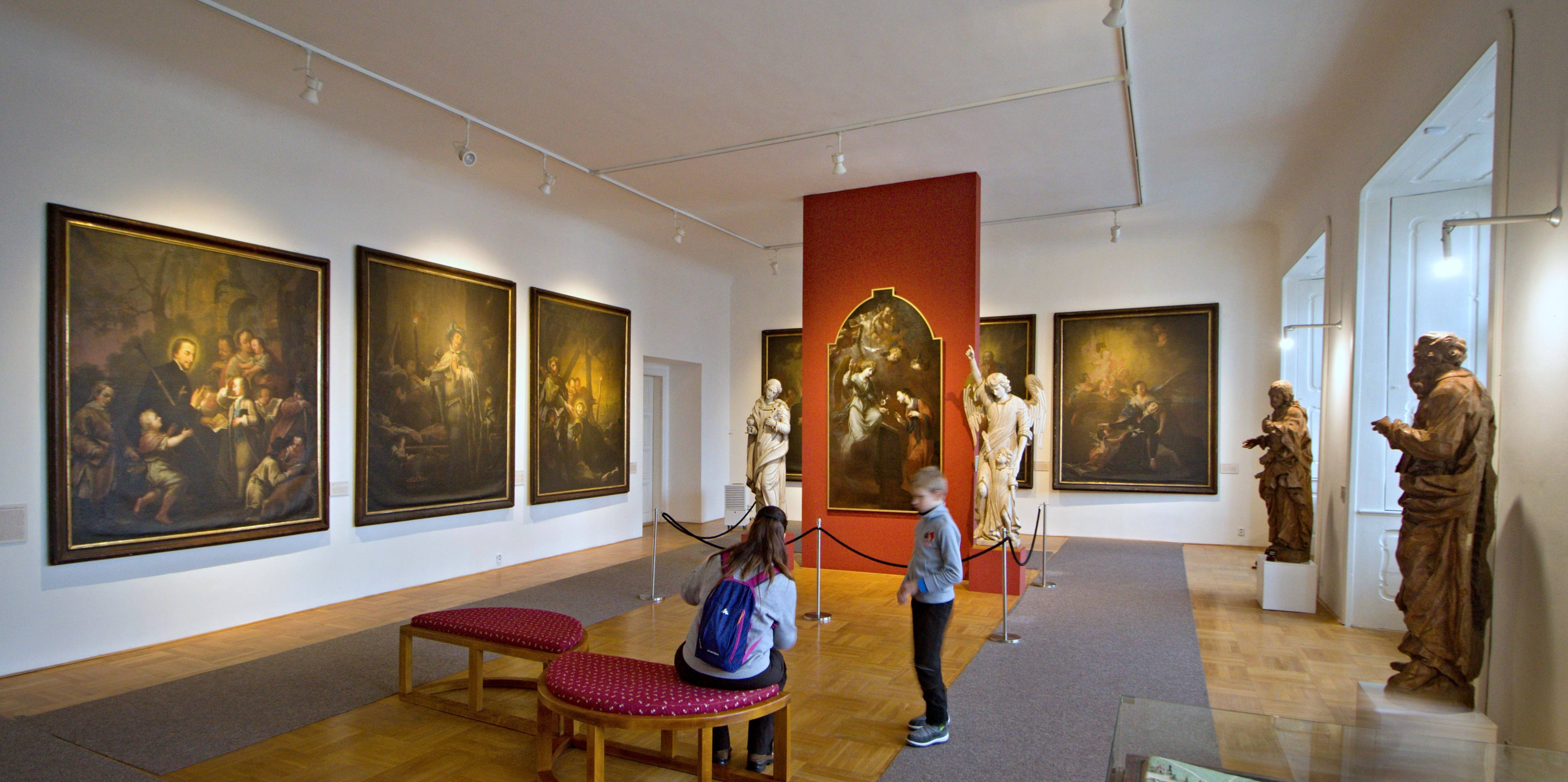 Regionální muzeum & galerie - zámek Jičín